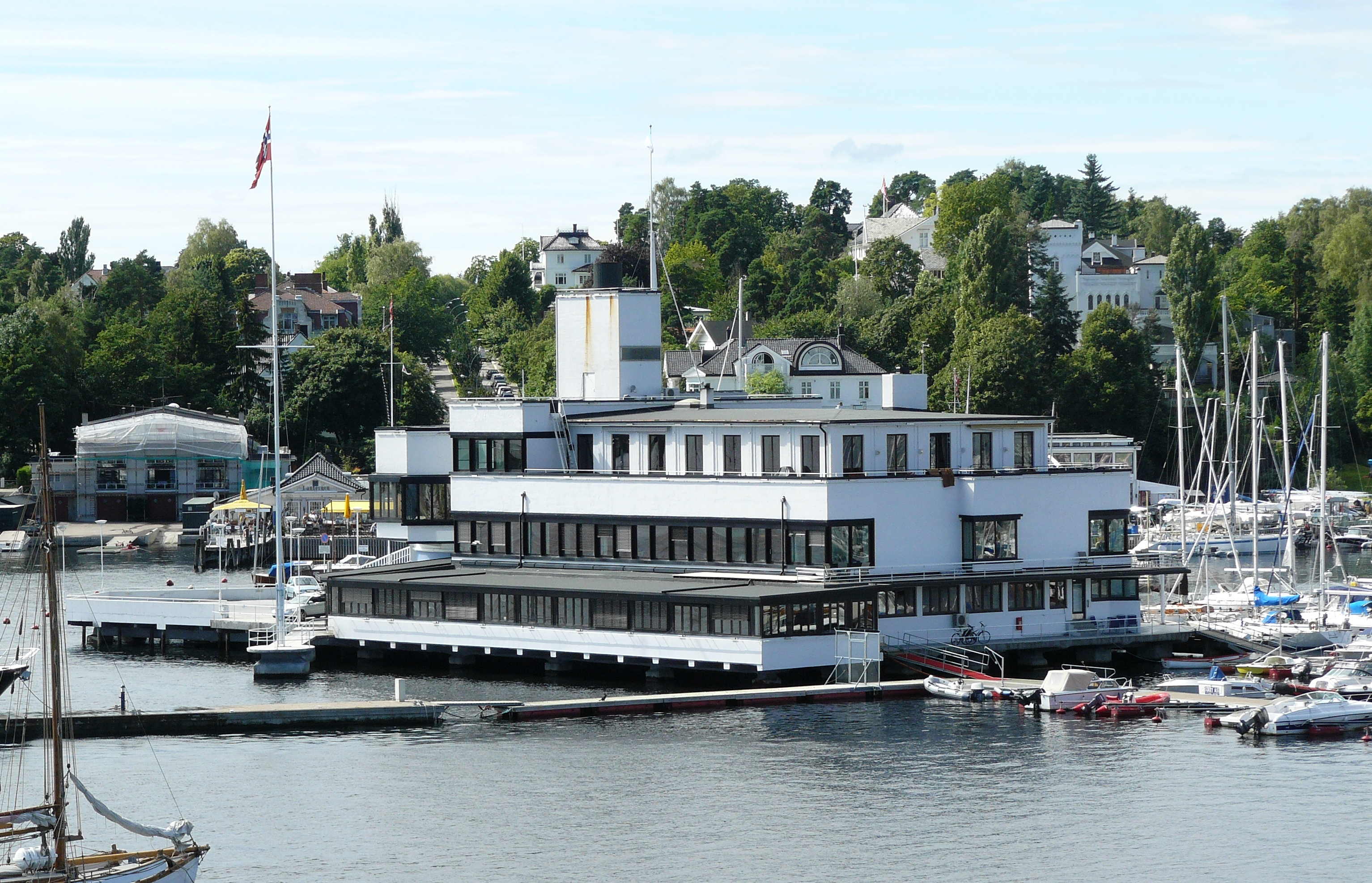 Dronningen, building in Frogner, Oslo